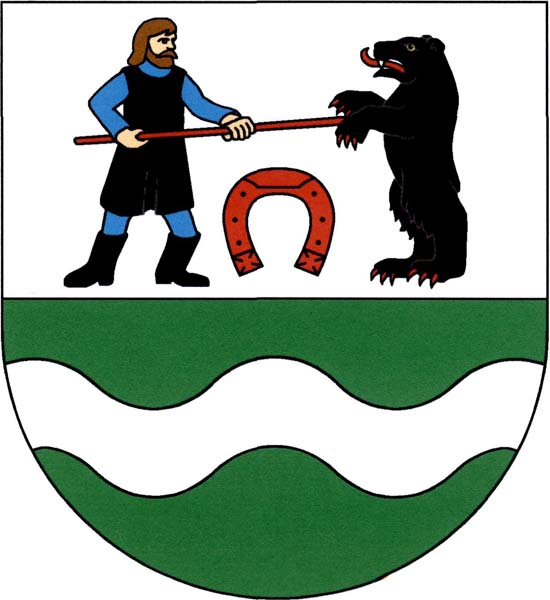 znak obce Dolní Lánov